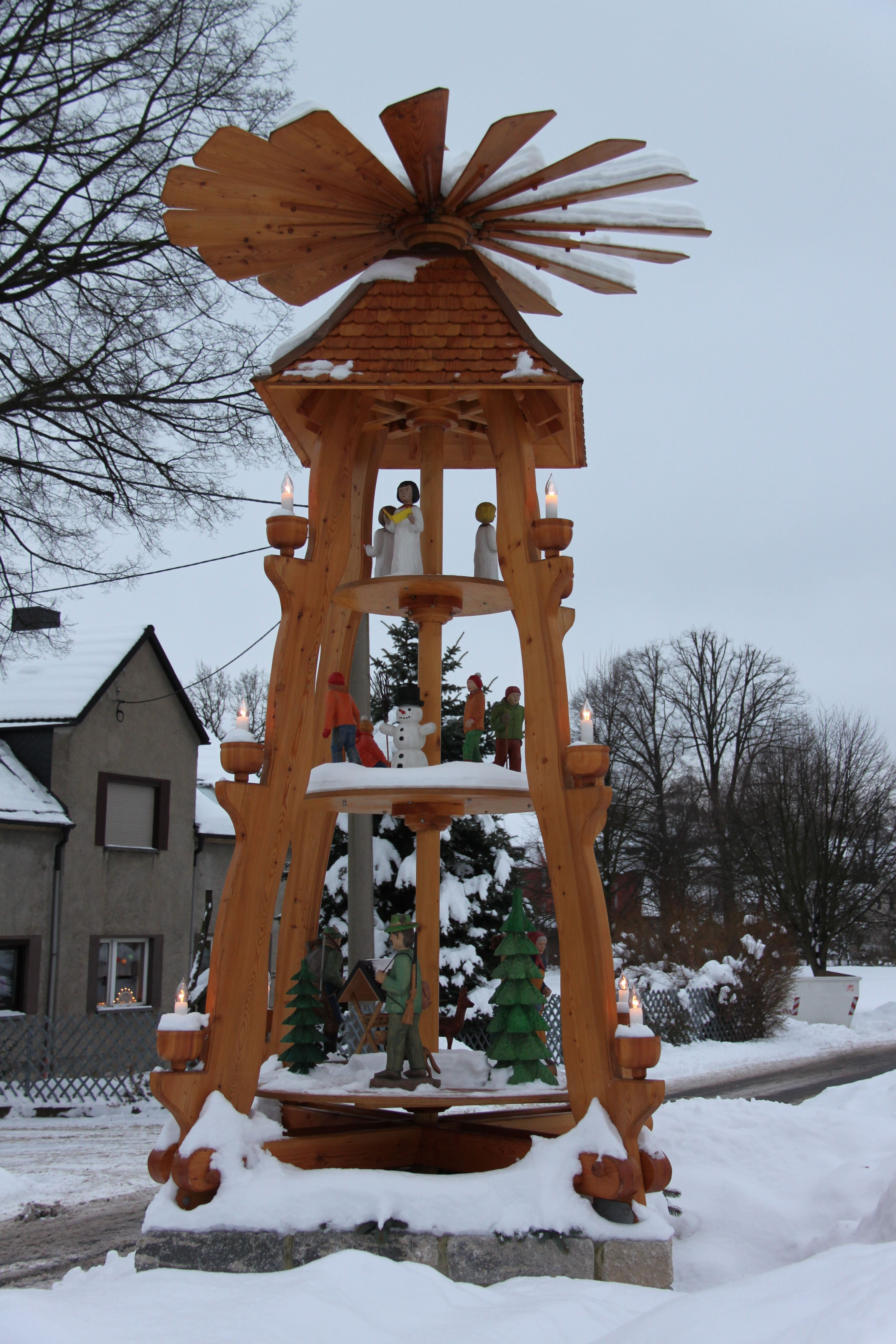 Ortypyramide in Niederdorf